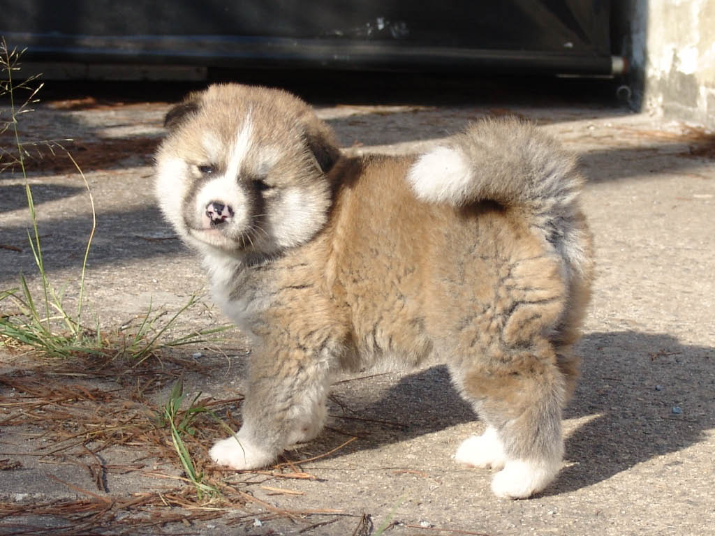 Japanese Akita Puppy